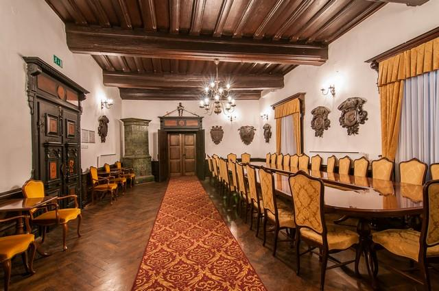 Konferenčna dvorana Gradu Sevnica